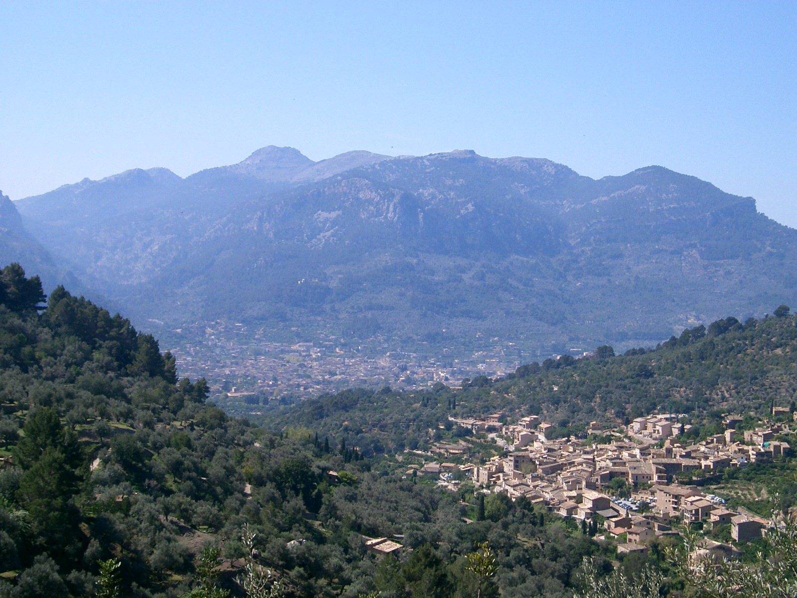 Fornalutx, amb Sóller i el massís del Teix al fons. Mallorca.